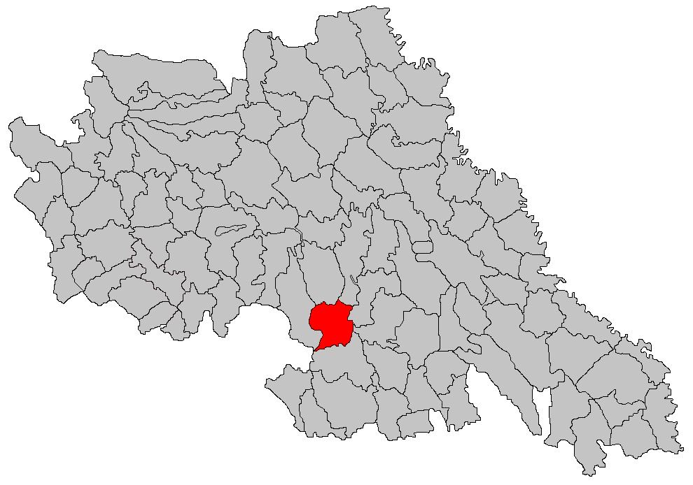 Categorie:Hărţi ale judeţului Iaşi